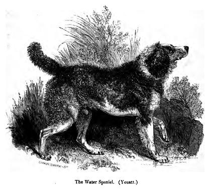 Water Spaniel